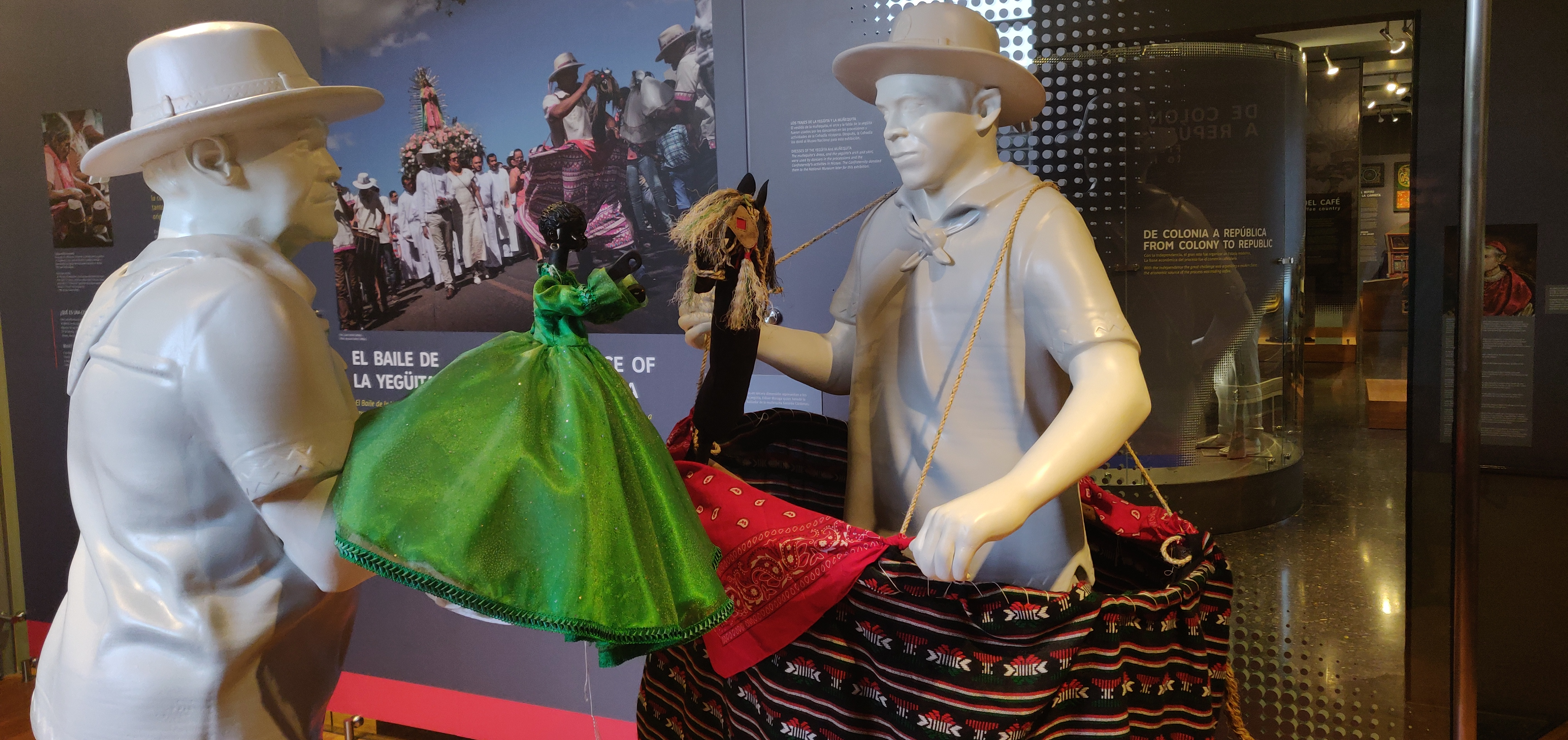 Diorama en el Museo Nacional de Costa Rica que representa el baile de la Yegüita. Esta danza folclórica se celebra el 11 de diciembre en la ciudad de Nicoya, Guanacaste, en honor a la Virgen de Guadalupe, patrona de la ciudad. La danza se origina en una leyenda: un par de indígenas reñían por motivos desconocidos. Una mujer, testigo de la pelea, rogó a la Virgen de Guadalupe que la detuviera para que los hombres no se mataran. Entonces, apareció una yegua negra que separó a los contendientes, milagro que entonces se atribuyó a la Virgen. Para la celebración, se realiza una procesión con la imagen de la Virgen, delante de la cual danzan, al son de melodías indígenas, unos personajes que representan a la Yegüita y los indígenas de la leyenda, representados por figuras artesanales elaboradas para la ocasión.